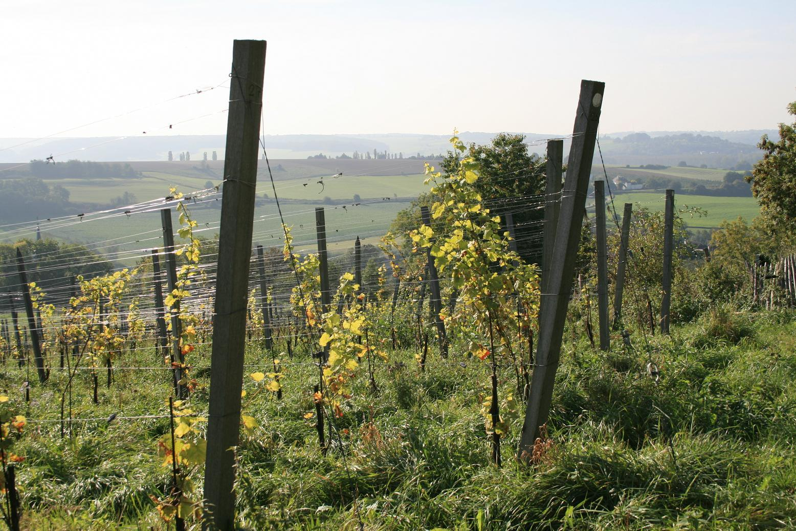 Limburgs: Wiengood Aldenborgh in Ees